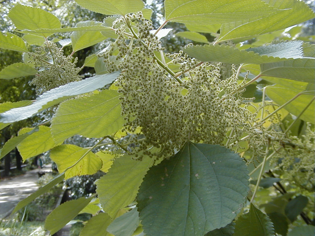 Boehmeria nivea. Real Jardín Botánico, Madrid.